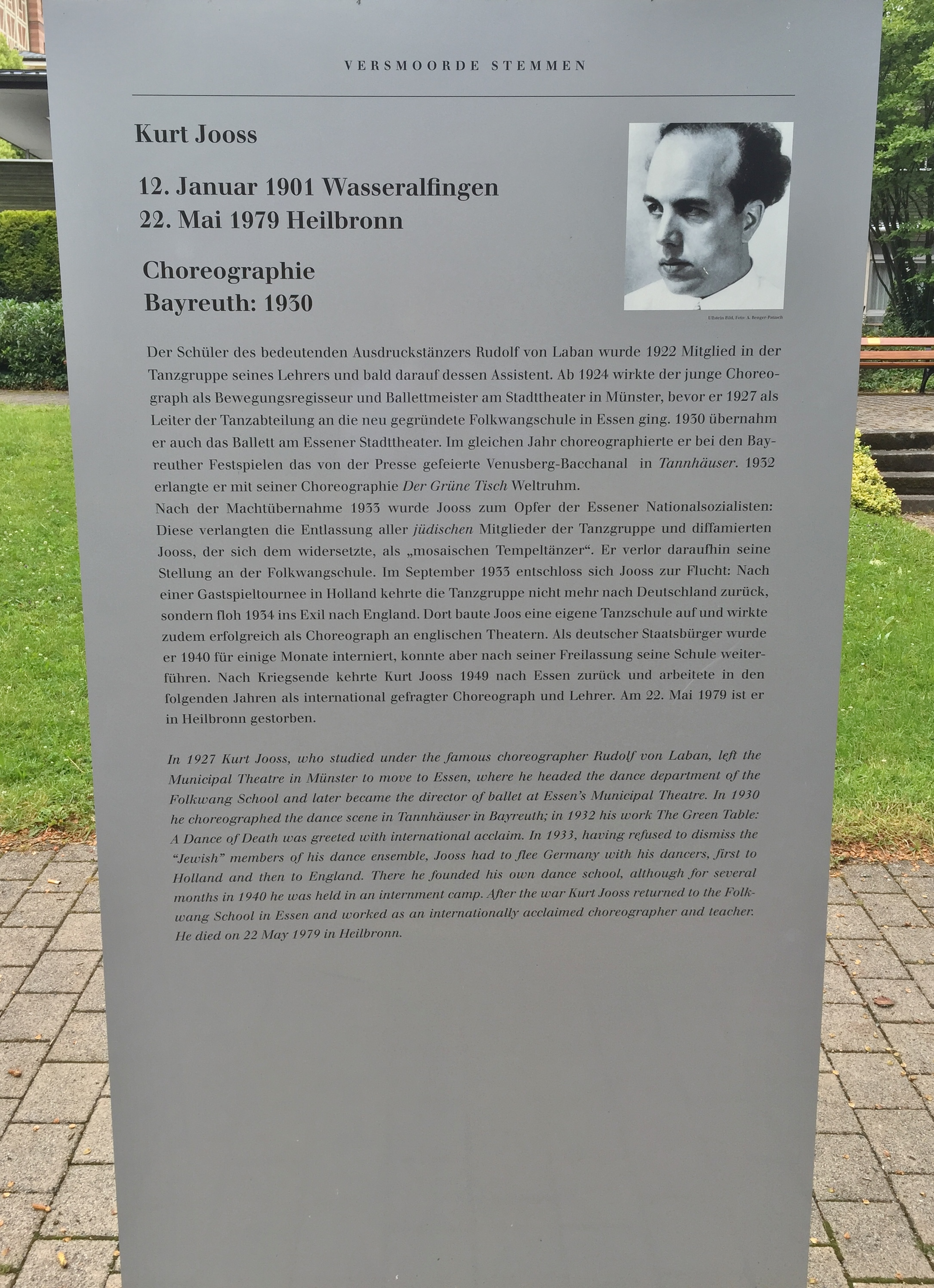 "Verstummte Stimmen - Die Bayreuther Festspiele und die 'Juden' 1876 bis 1945", Ausstellung 2016